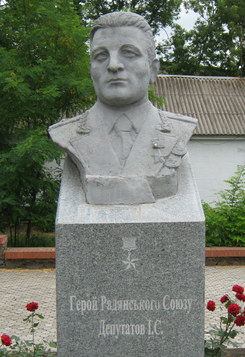 Погруддя Депутатова І. С. у Володарському